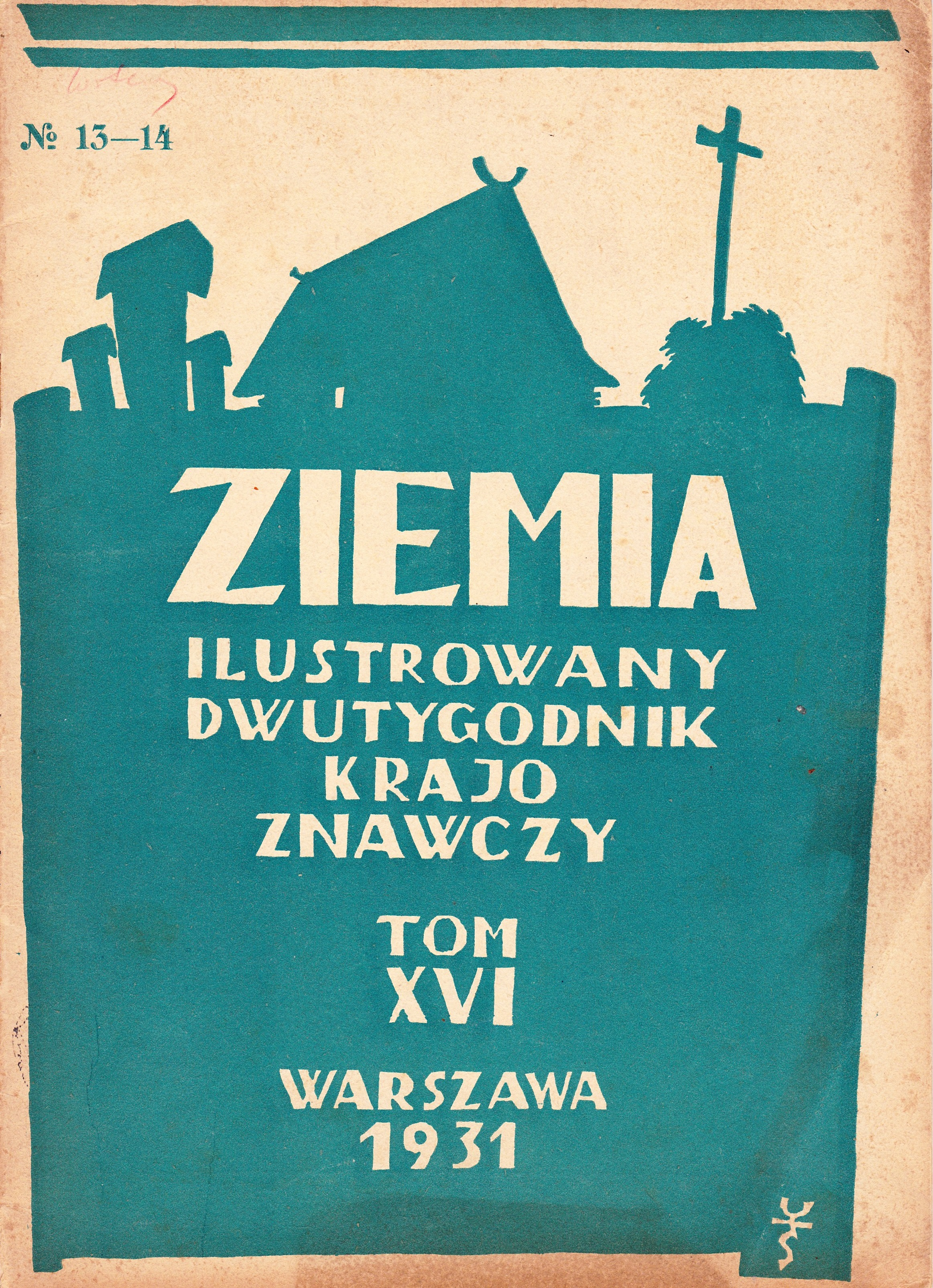 Ziemia rocznik poświęcony tematyce krajoznawczej.